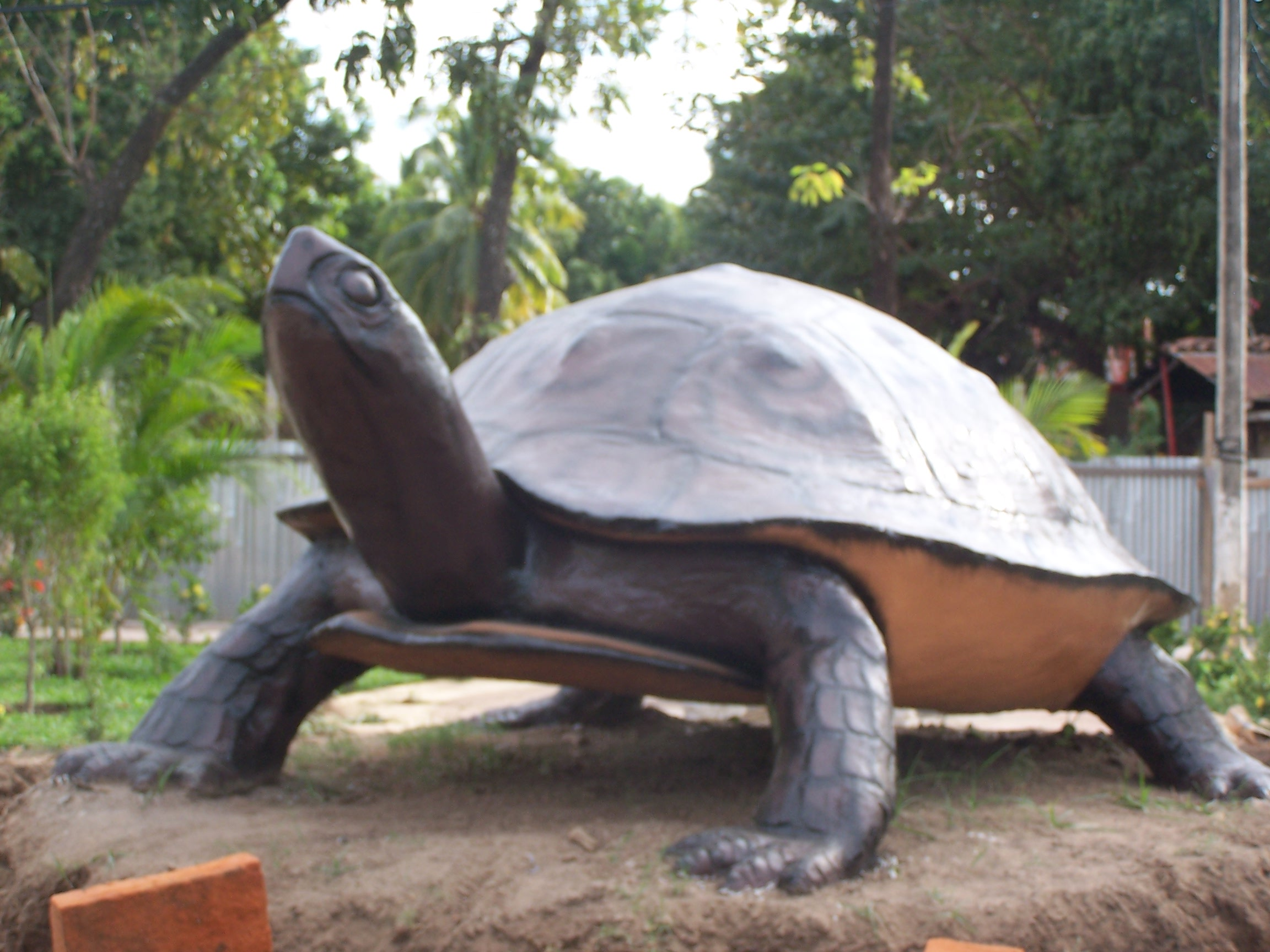 Tortuga de mar creada en honor a dicho animal.